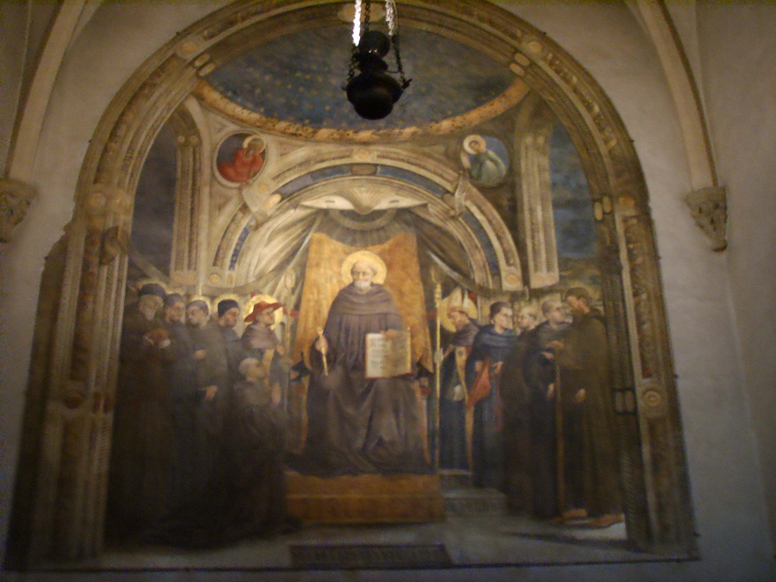 Santa Trinita, Neri_di_bicci, San Giovanni Gualberto and saints, inside, Florence, Italy